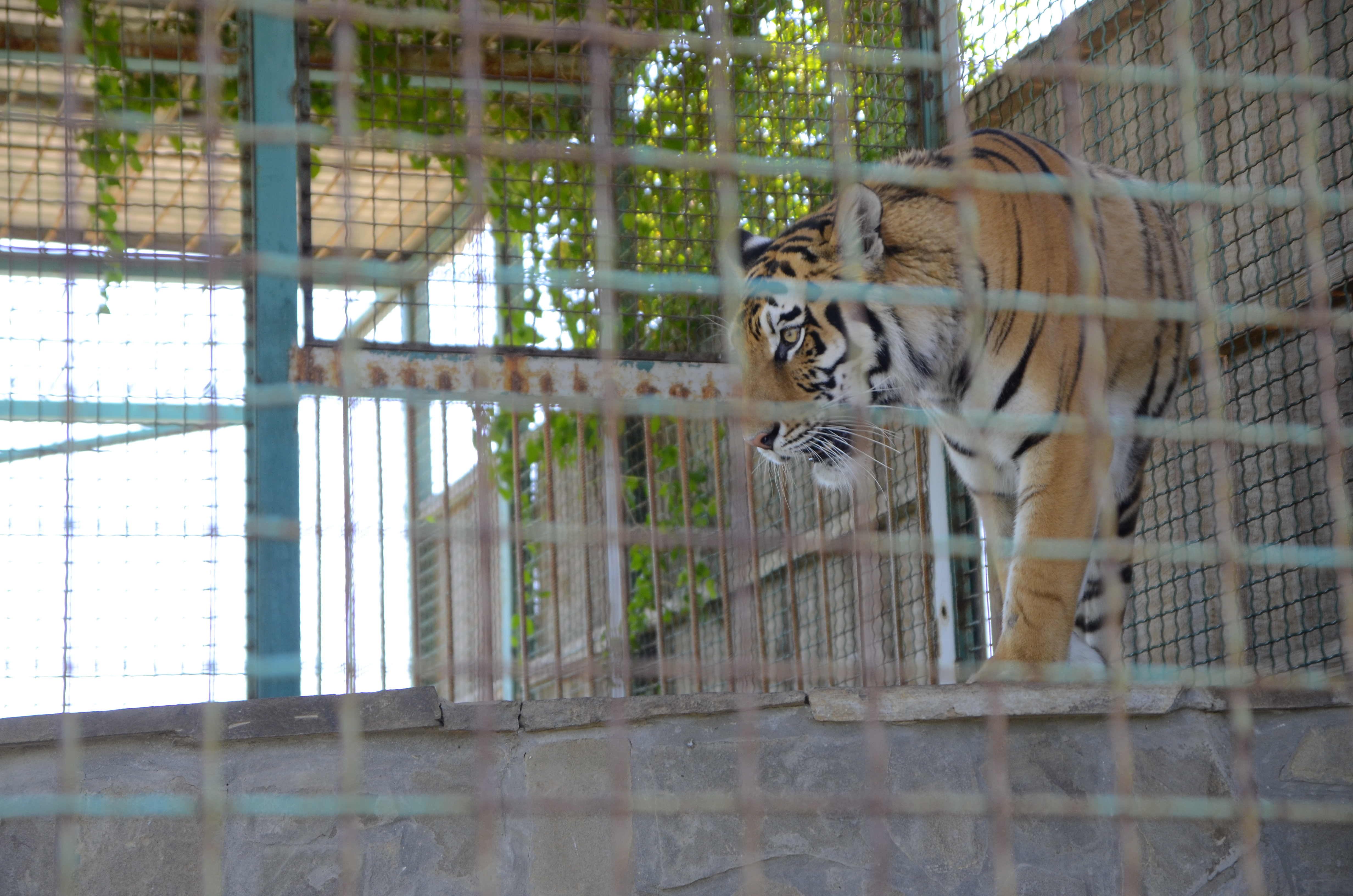 Бердянский зоопарк